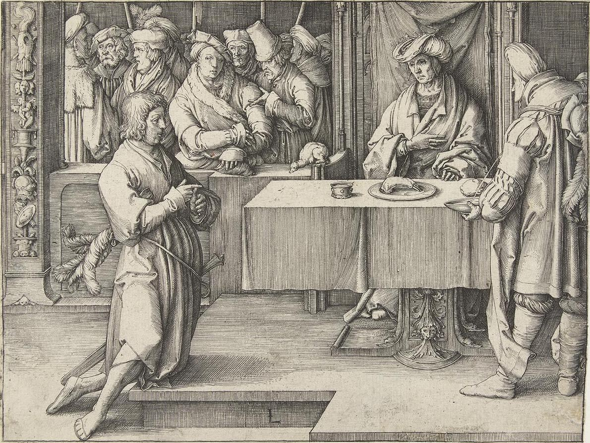 Josef verklaart de dromen van Farao (uit de serie Geschiedenis van Josef). engraving. 12,6 × 16,6 cm. Amsterdam, Rijksmuseum Amsterdam. Inventory number RP-P-OB-1596. Overdracht beheer 1816.